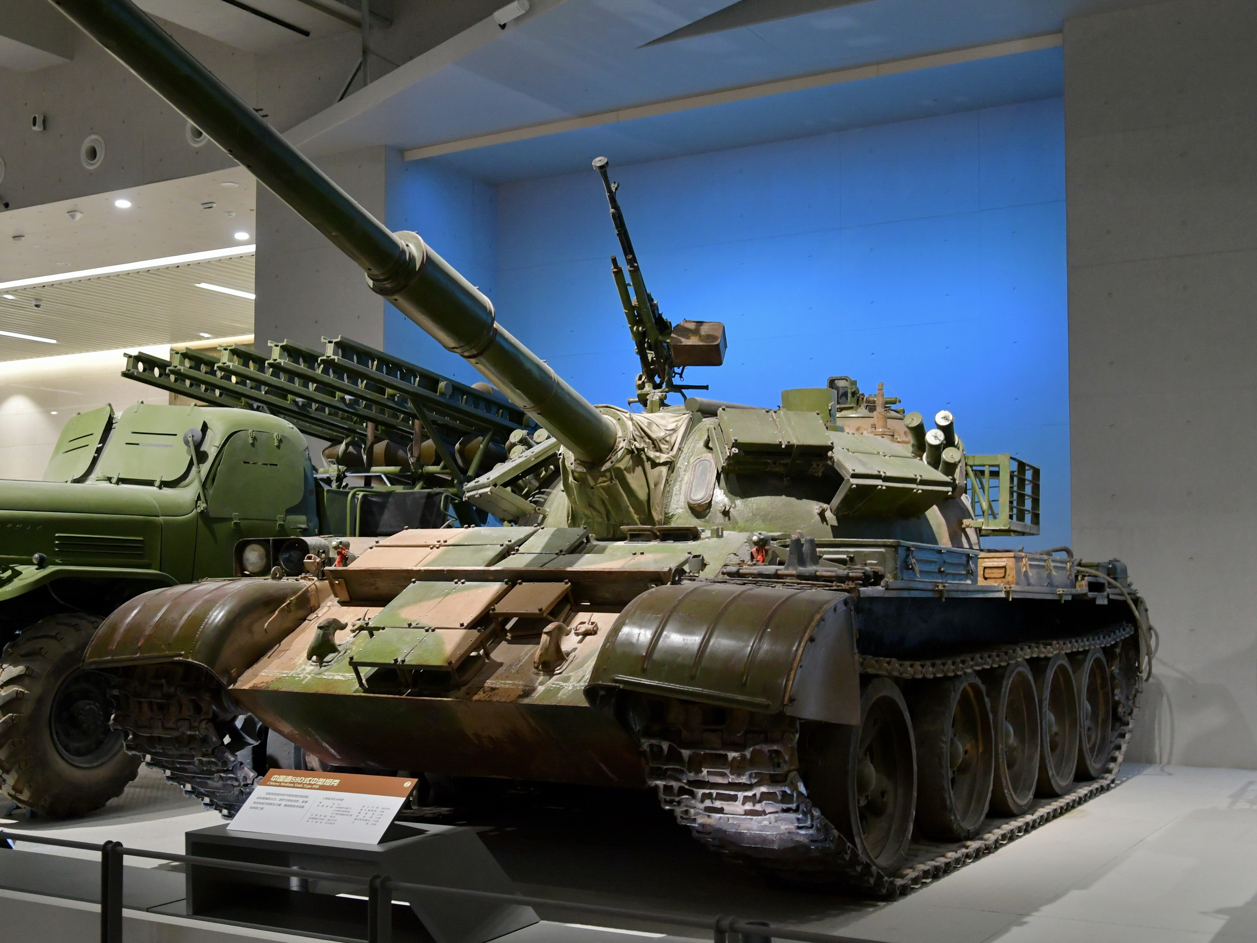 59D式坦克, 保存在中国人民革命军事博物馆.